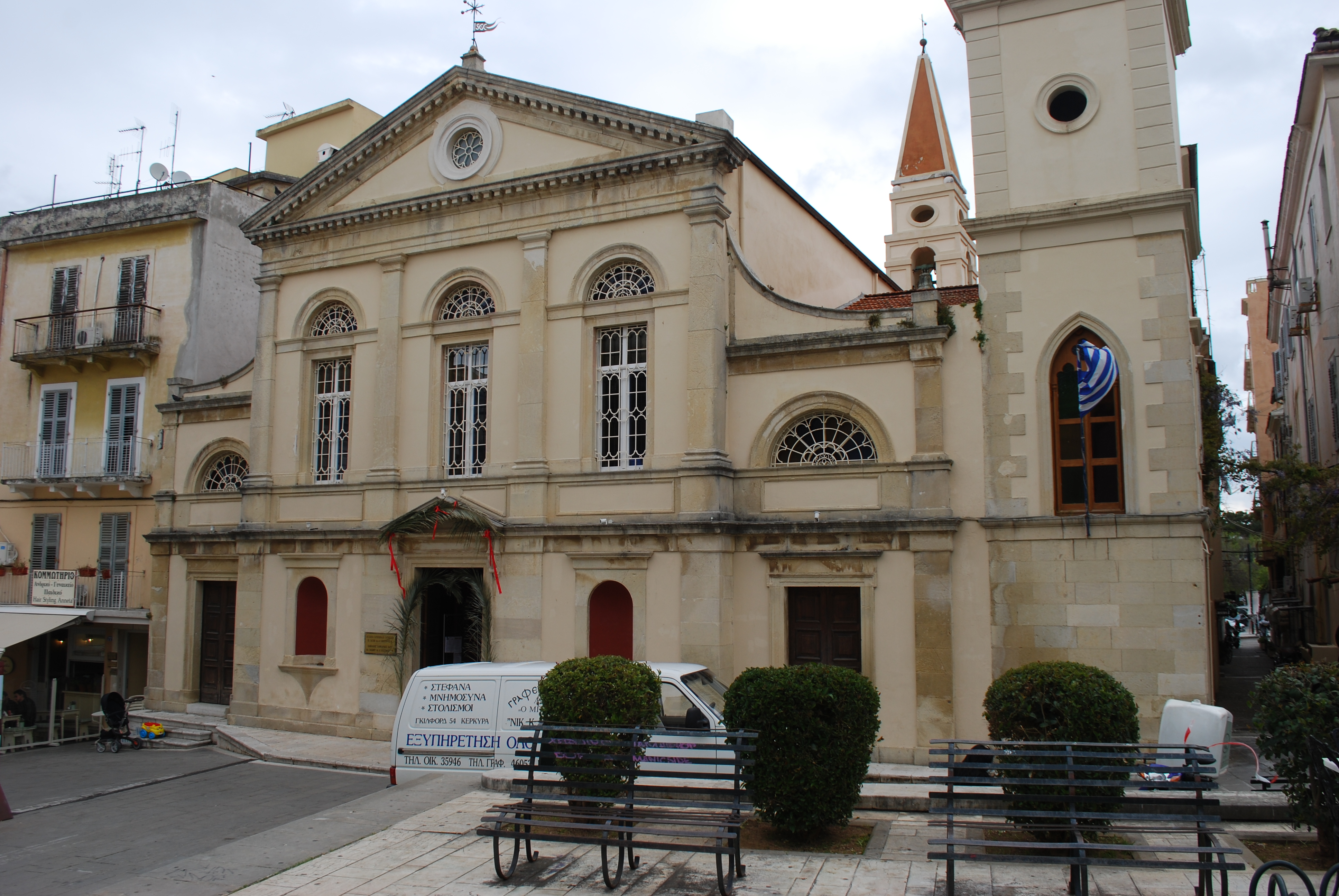 Vue de la vieille ville de Corfou.